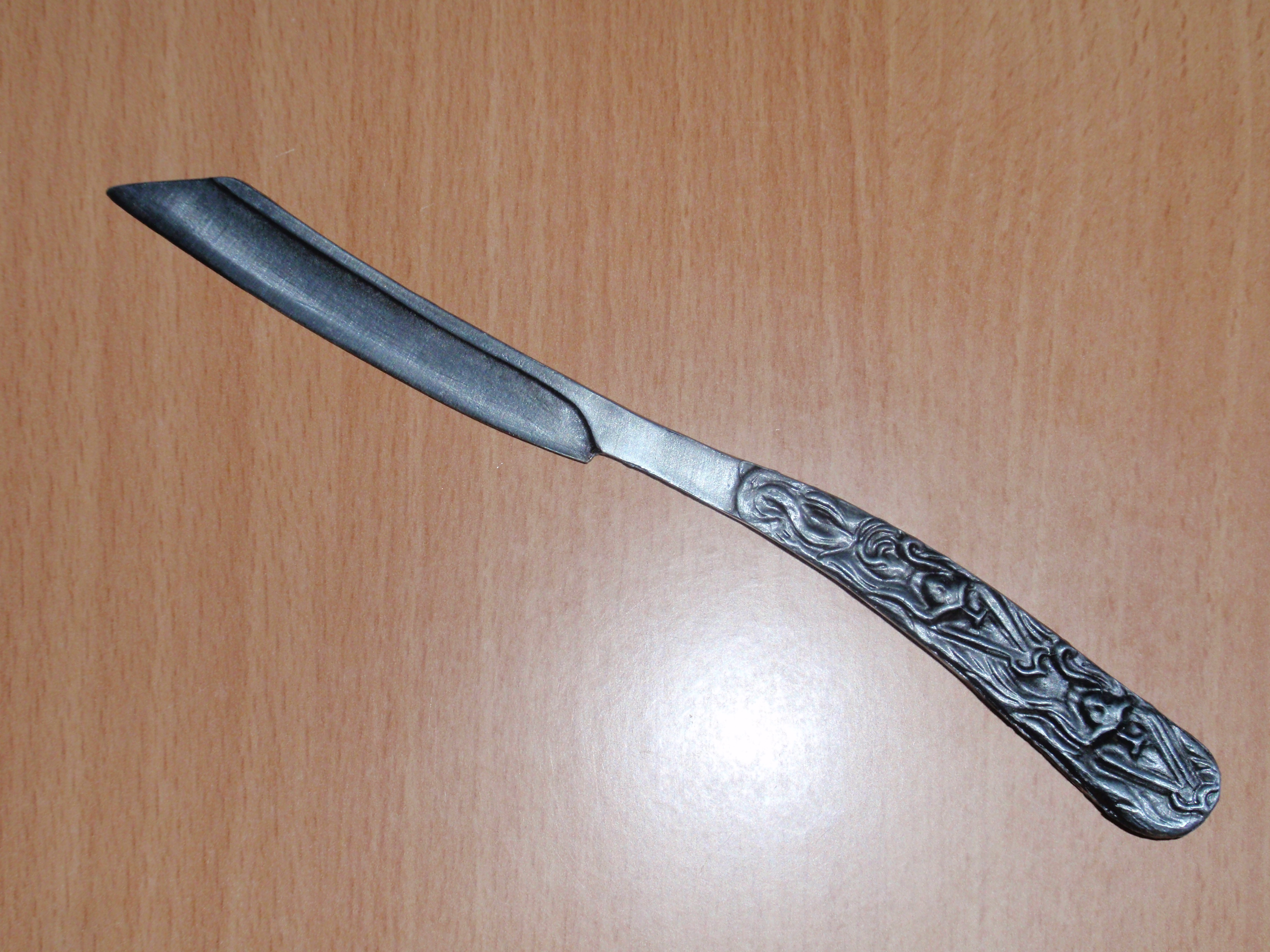 Scheermes a la Sweeney Todd (briefopener-replica)